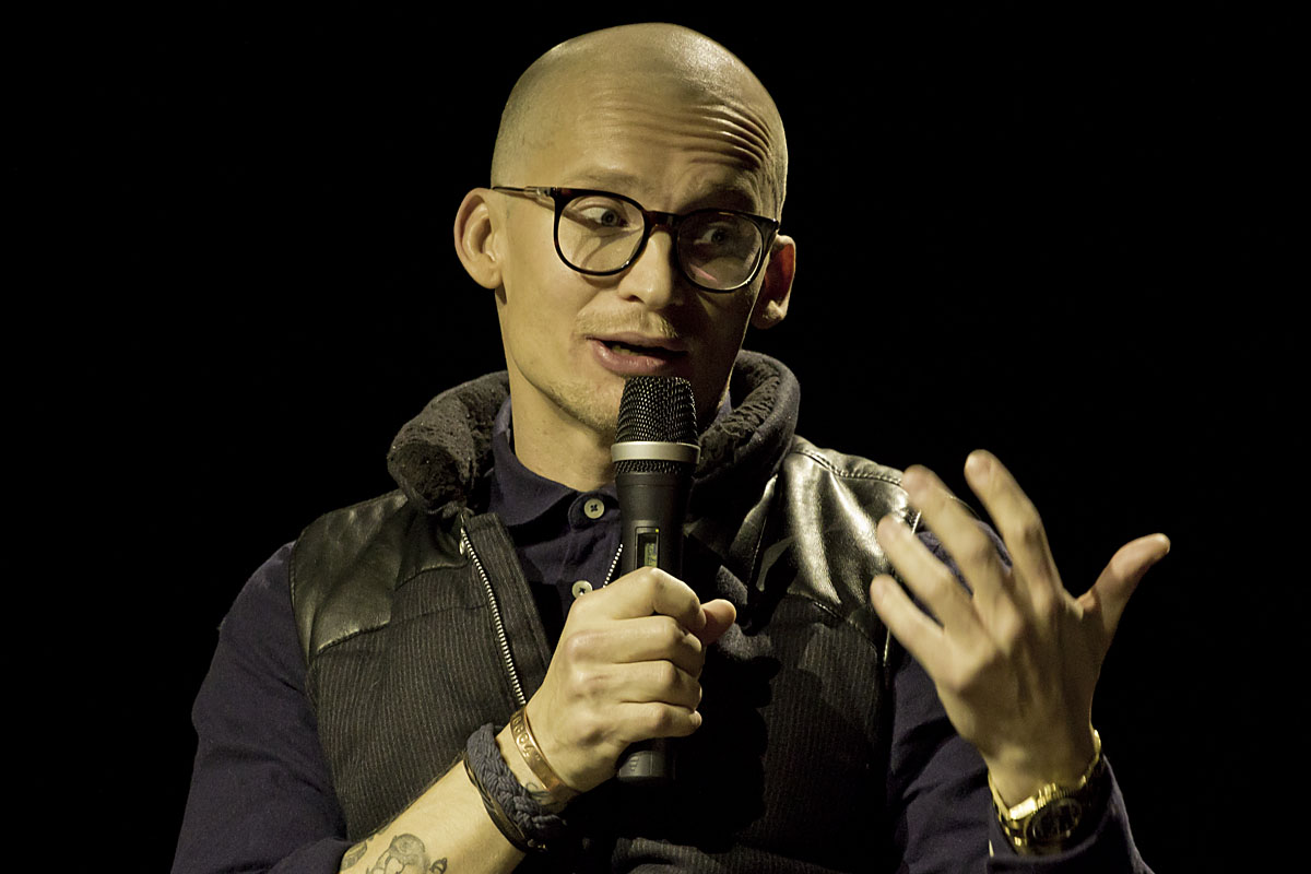 Christian Stadil ved arrangementet Zetland Live #4 på Bremen Teater 21. februar 2013